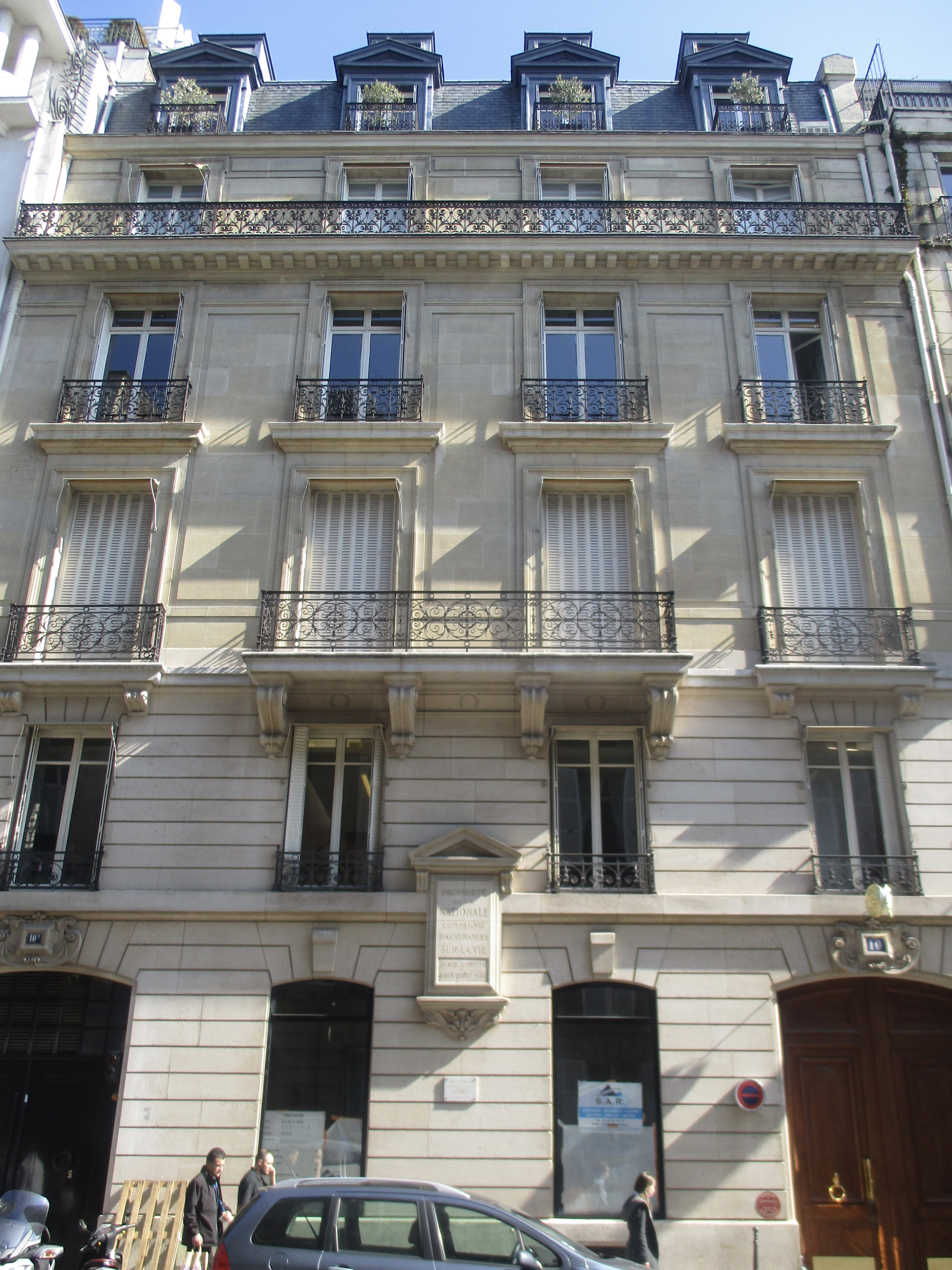 10 rue de Marignan, Paris VIIIe.